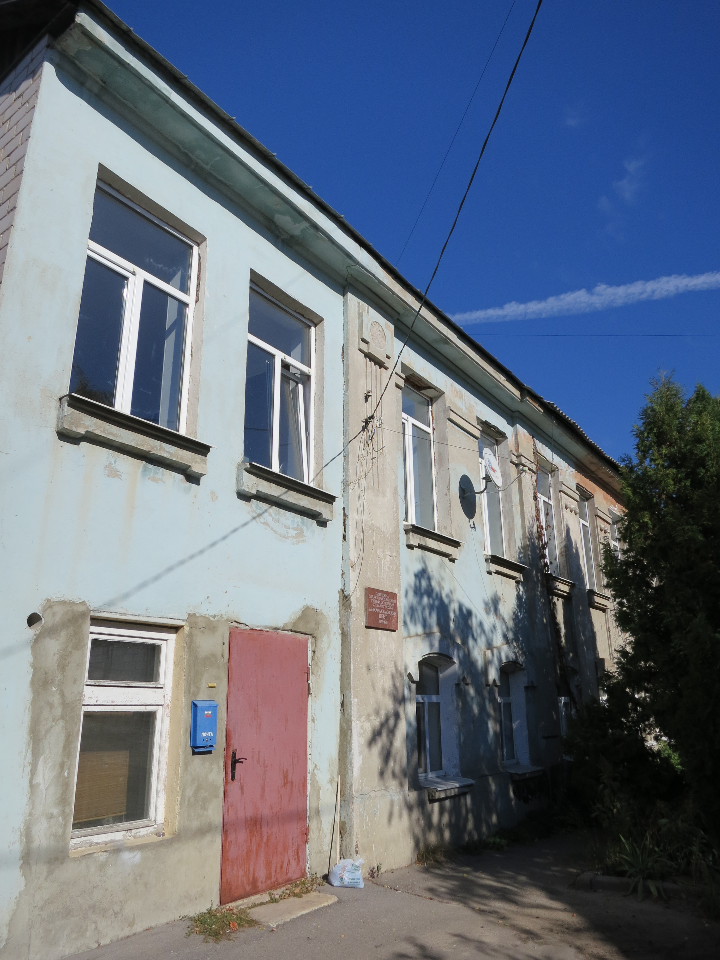 Дома, в которых жил ботаник и биохимик М. С. Цвет: улица Батуринская, 18-20, 22, Воронеж, Воронежская область